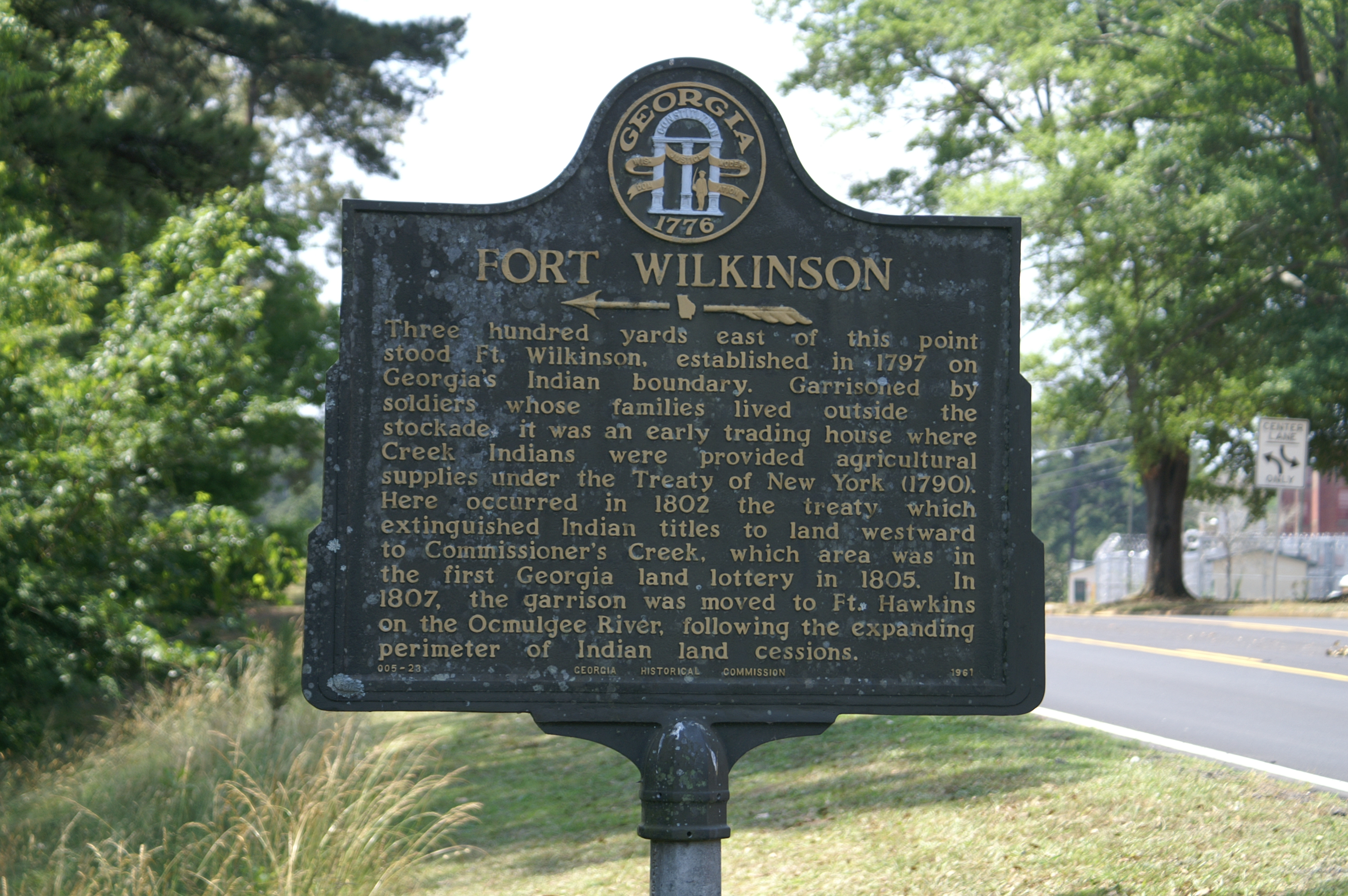 Fort Wilkinson GHM 005-23